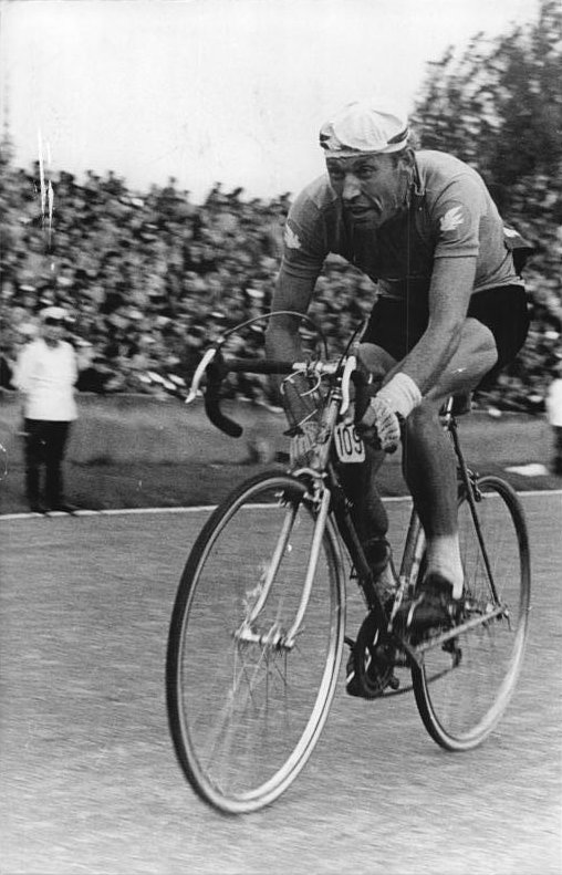 Viktor Kapitonow Zentralbild Wendorf 12.5.1961 XIV. Internationale Friedensfahrt Warschau-Berlin-Prag 1961.9.Etappe von Leipzig über Halle nach Karl-MArx-Stadt am 11.5.1961. UBz: Im Einzelzeitfahren kam Viktor Kapitonow mit 1:05:40 auf den 9.Platz.